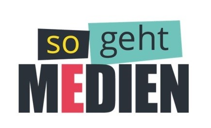 Logo "so geht MEDIEN"